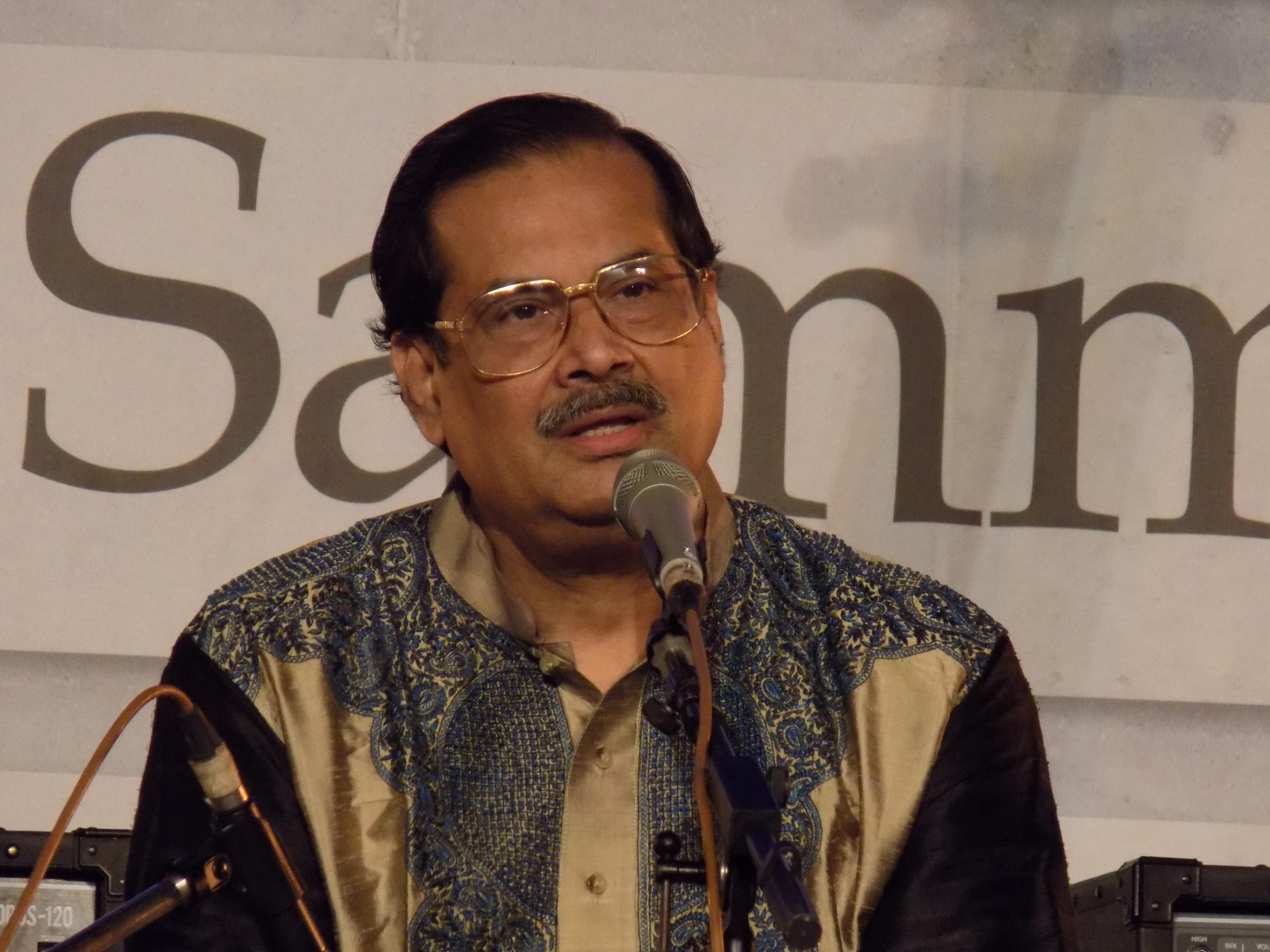 Photographed in Kolkata, India